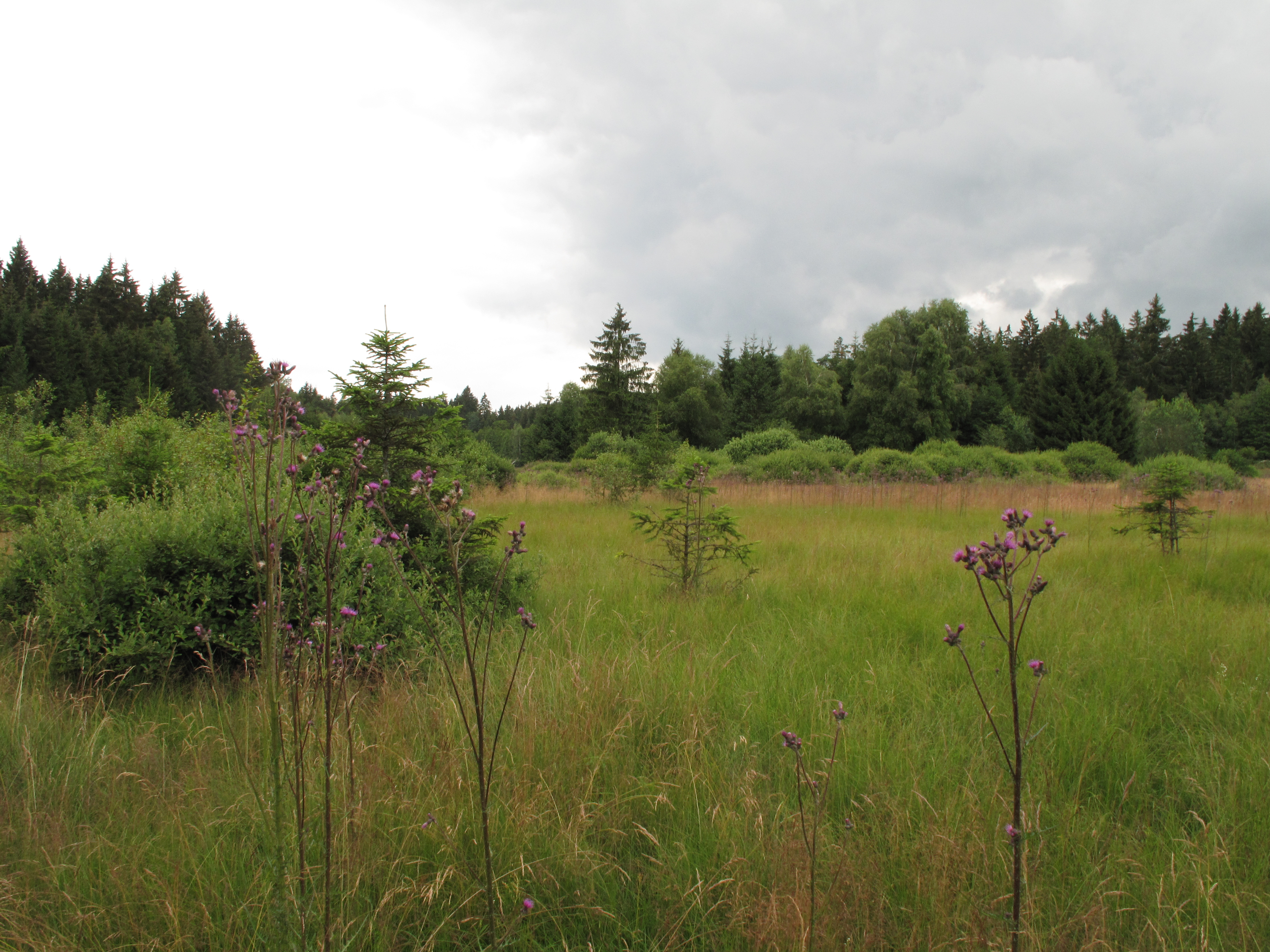 Přírodní památka Borky. Okres Pelhřimov, Česká republika.